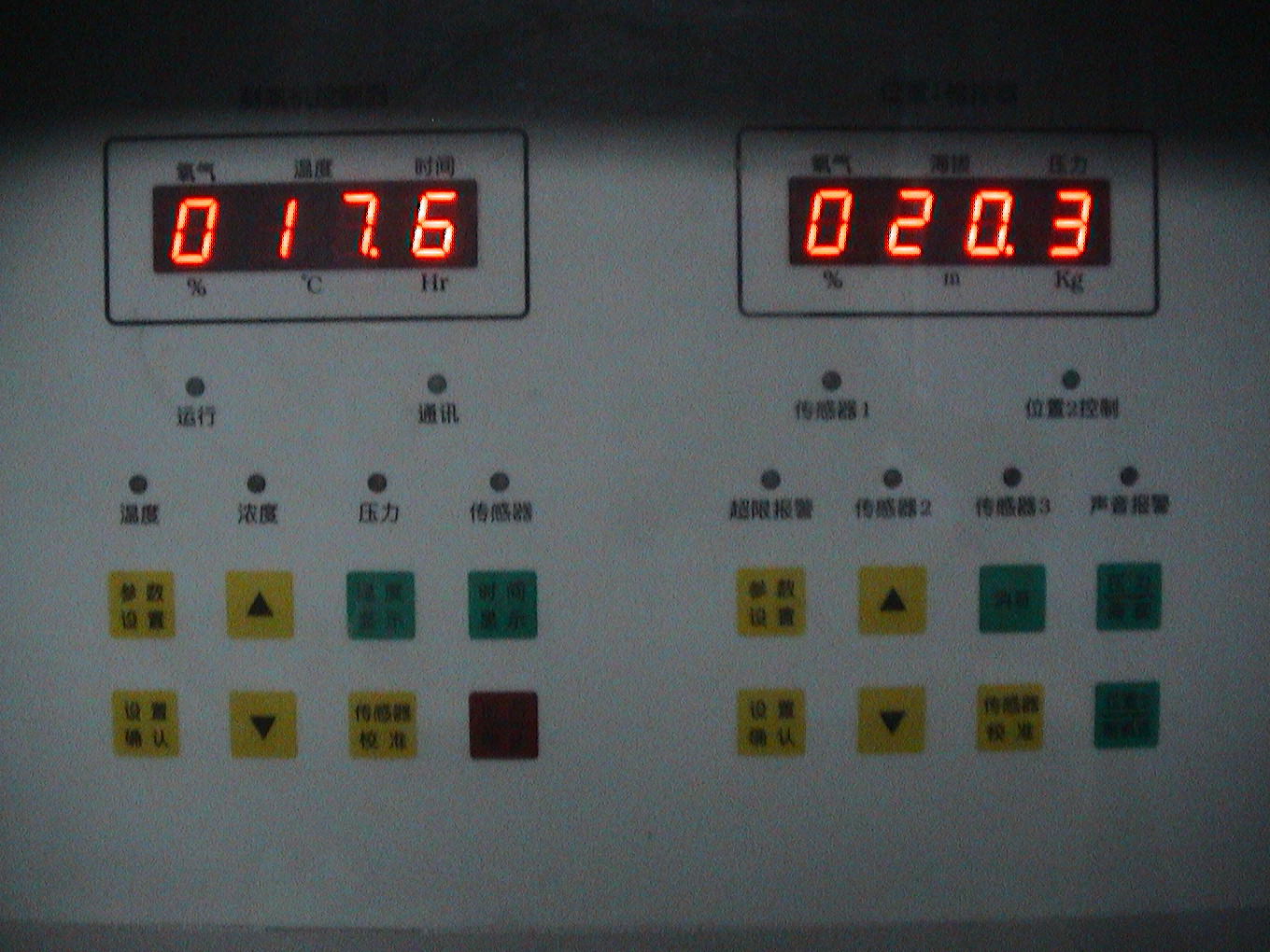 制氧机控制器